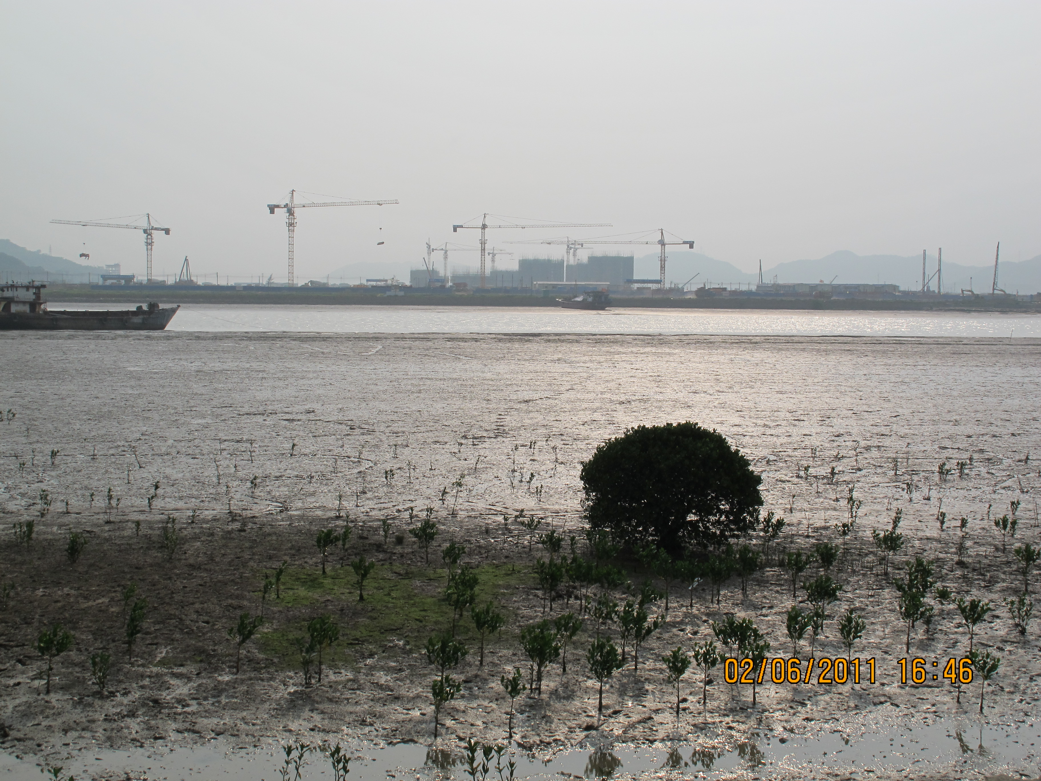 中文（香港）: 正在大興土木的橫琴新區